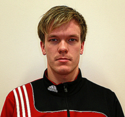 Koskenkorvan Urheilijoiden kauden 2014 pelaajakuva. Pelaaja: Jussi Heikkilä